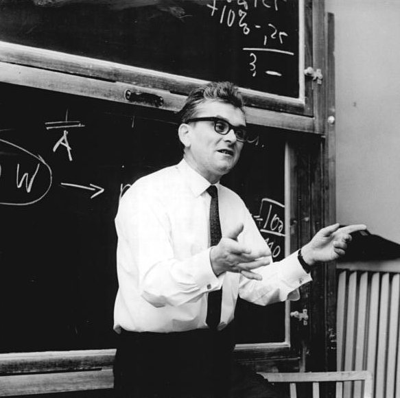 Bernau, Lehrer der Gewerkschaftsschule Zentralbild Koard 4.6.70 Bernau b. Berlin: Schule der Solidarität - Viele Freunde aus jungen Nationalstaaten u.a. Ländern der Erde studieren jährlich an der Deutschen Hochschule der Gewerkschaften "Fritz Heckert" in der DDR. Dr. Hubert Filipowski gehört zu den Lehrern, die all' ihr Wissen und Können uneingeschränkt weitervermitteln. Unser Foto zeigt ihn während eines Seminars zum Thema: "Die Gewerkschaften und die Lohnpolitik". (Siehe auch 34-1N)